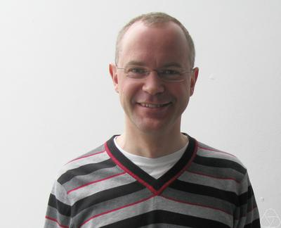 Foto di Hans Ringström